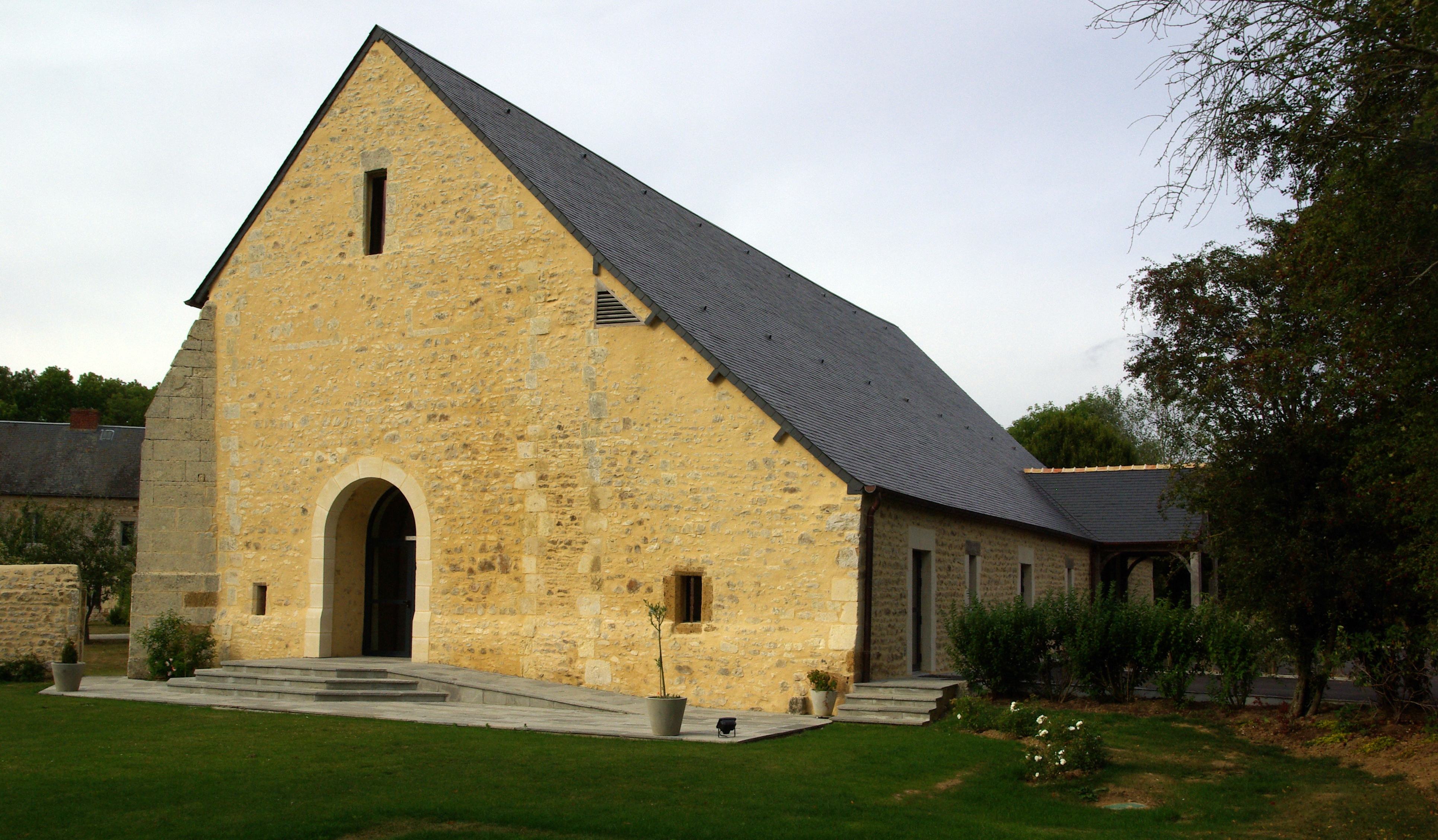 Grange aux dîmes de Foupendant, (Inscrit, 1995) .